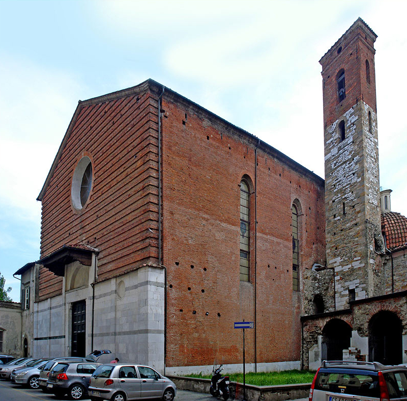 Igreja de S. Agostino, Lucca